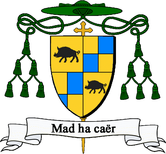 Palefarzhet : ouzh 1 ha 4 en aour e c'houezhoc'h en sabel, ouzh 2 ha 3, adpalefarzhet etre aour ha glazur